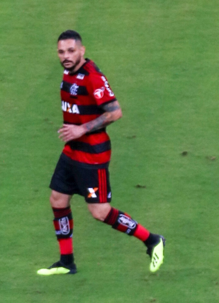 Pará jogando pelo Flamengo em 2018.